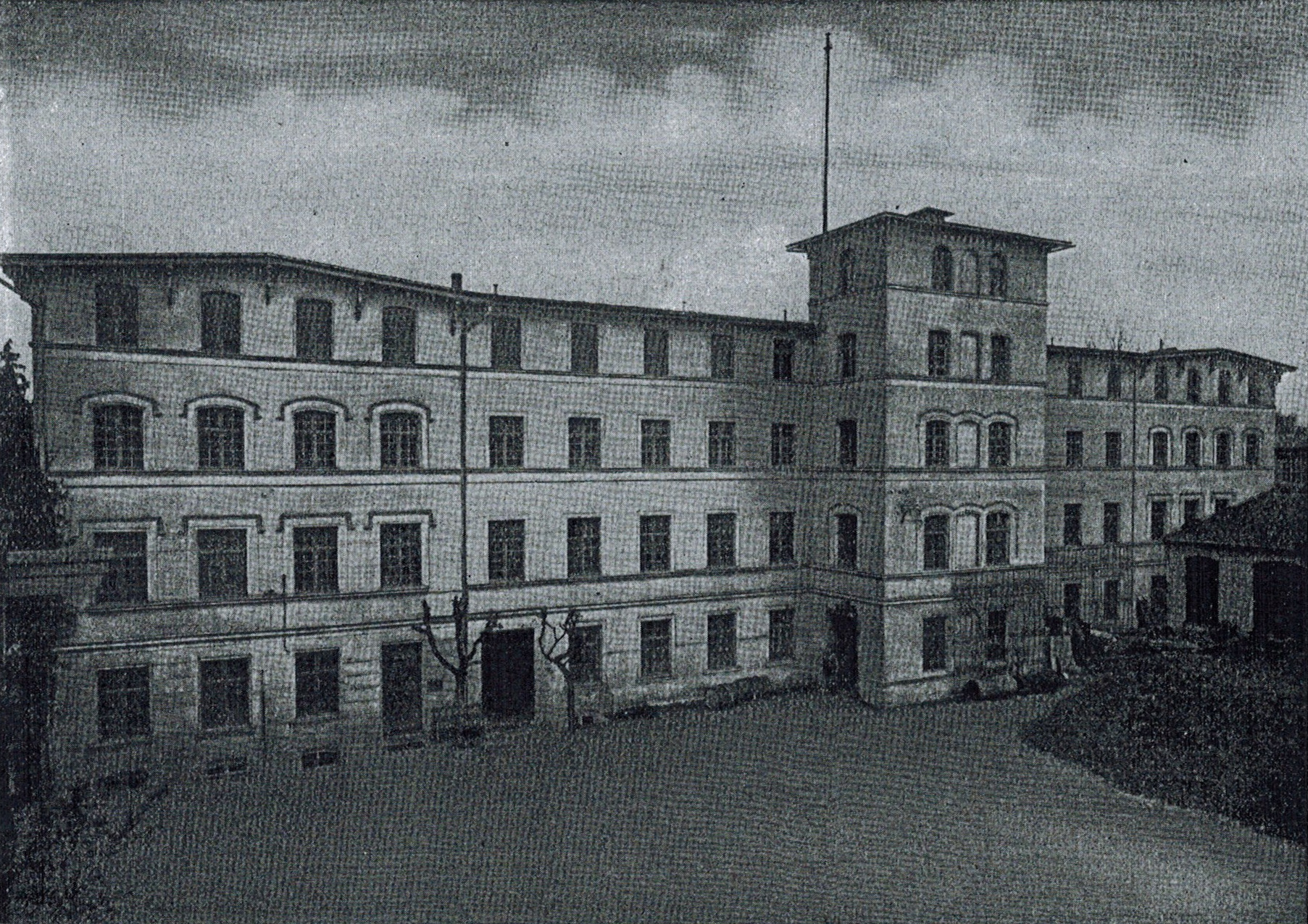 Hasselbach 002, früher